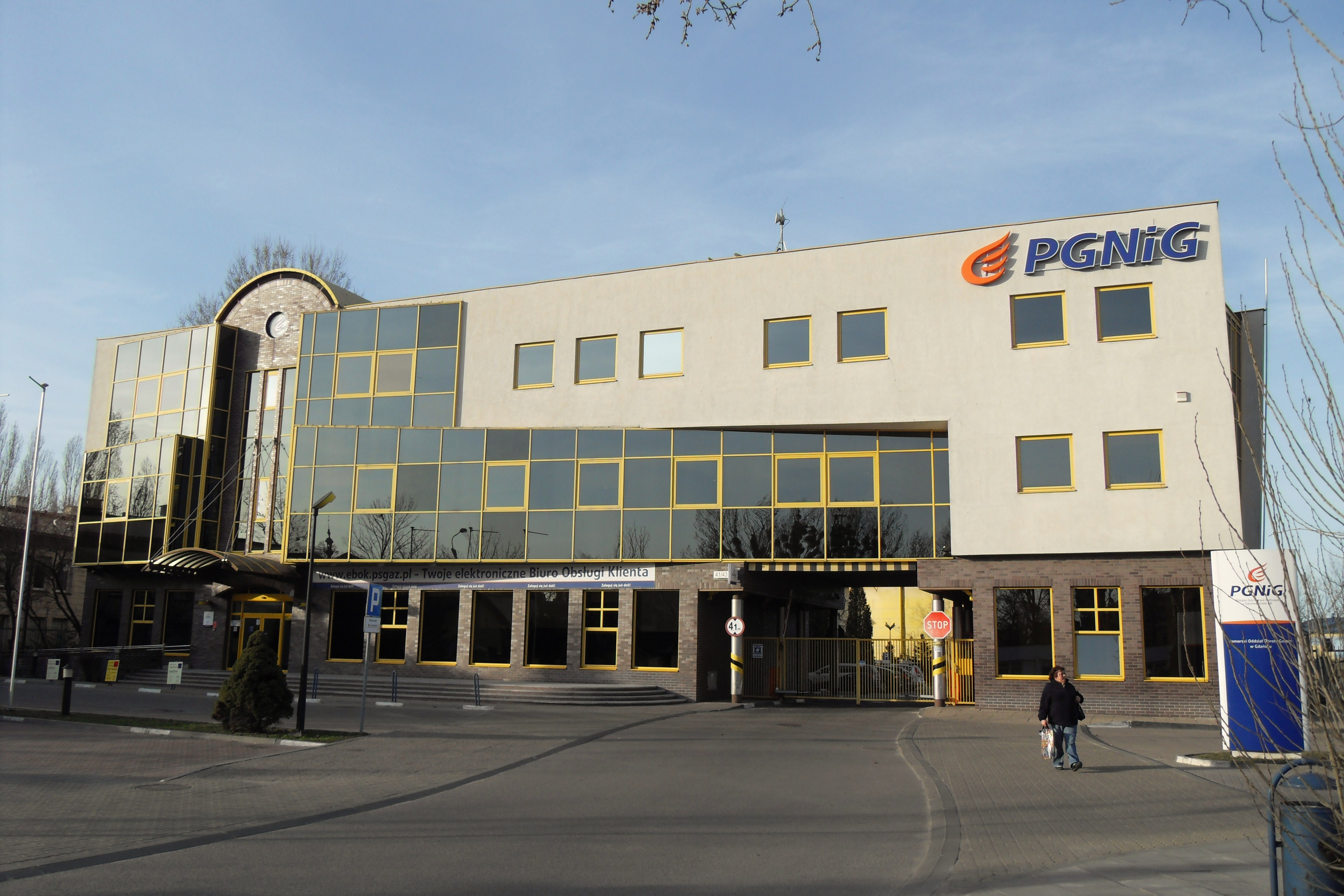 Gdańsk, ul. Wałowa 41/43. Pomorska Spółka Gazownictwa sp. z o.o.